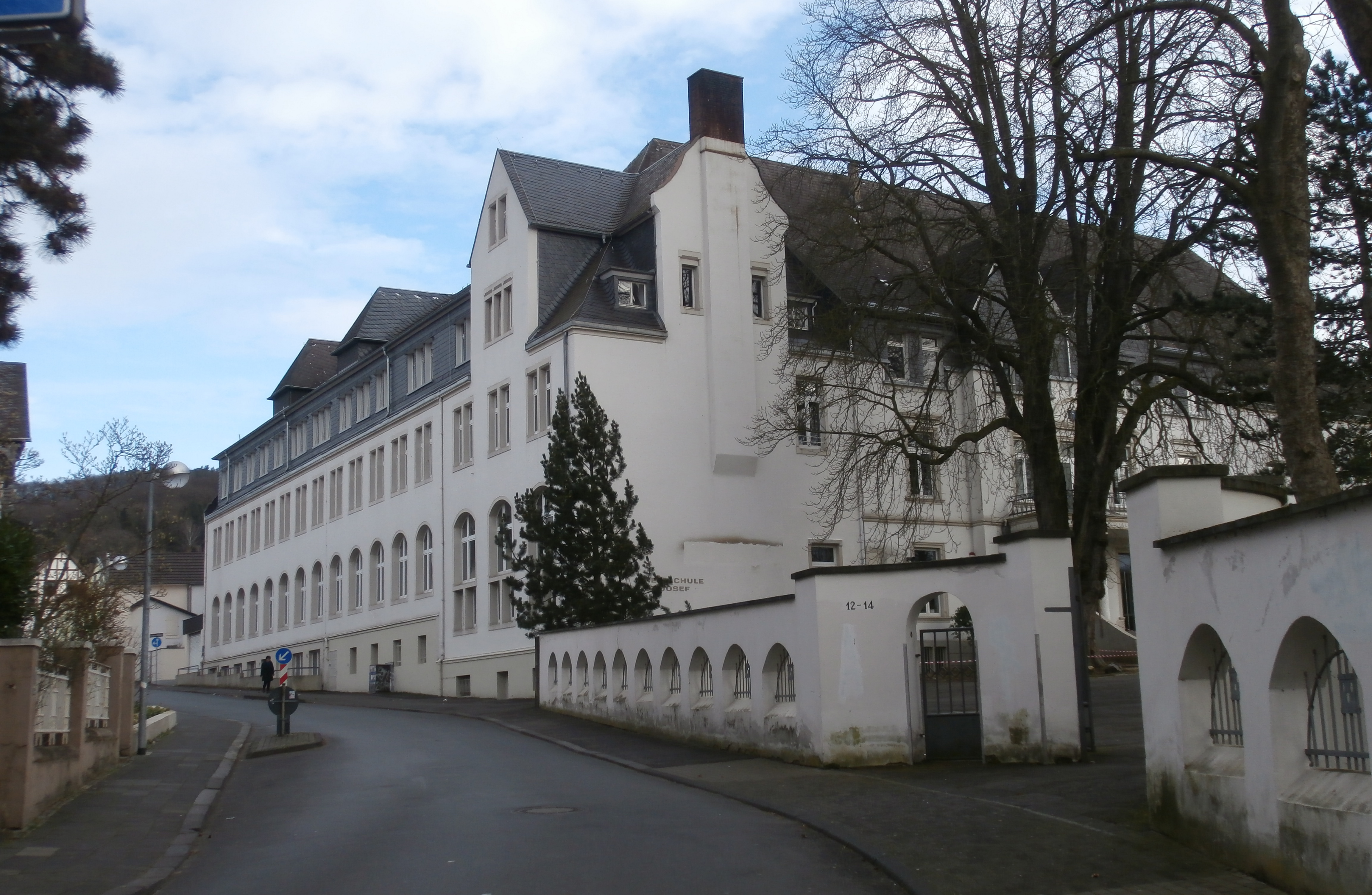 Erzbischöfliche Realschule Sankt Josef (ehemaliges Kloster St. Joseph), Rommersdorfer Straße 53–57/Bismarckstraße 12–14, Bad Honnef: Flügel an der Bismarckstraße (erbaut 1907)